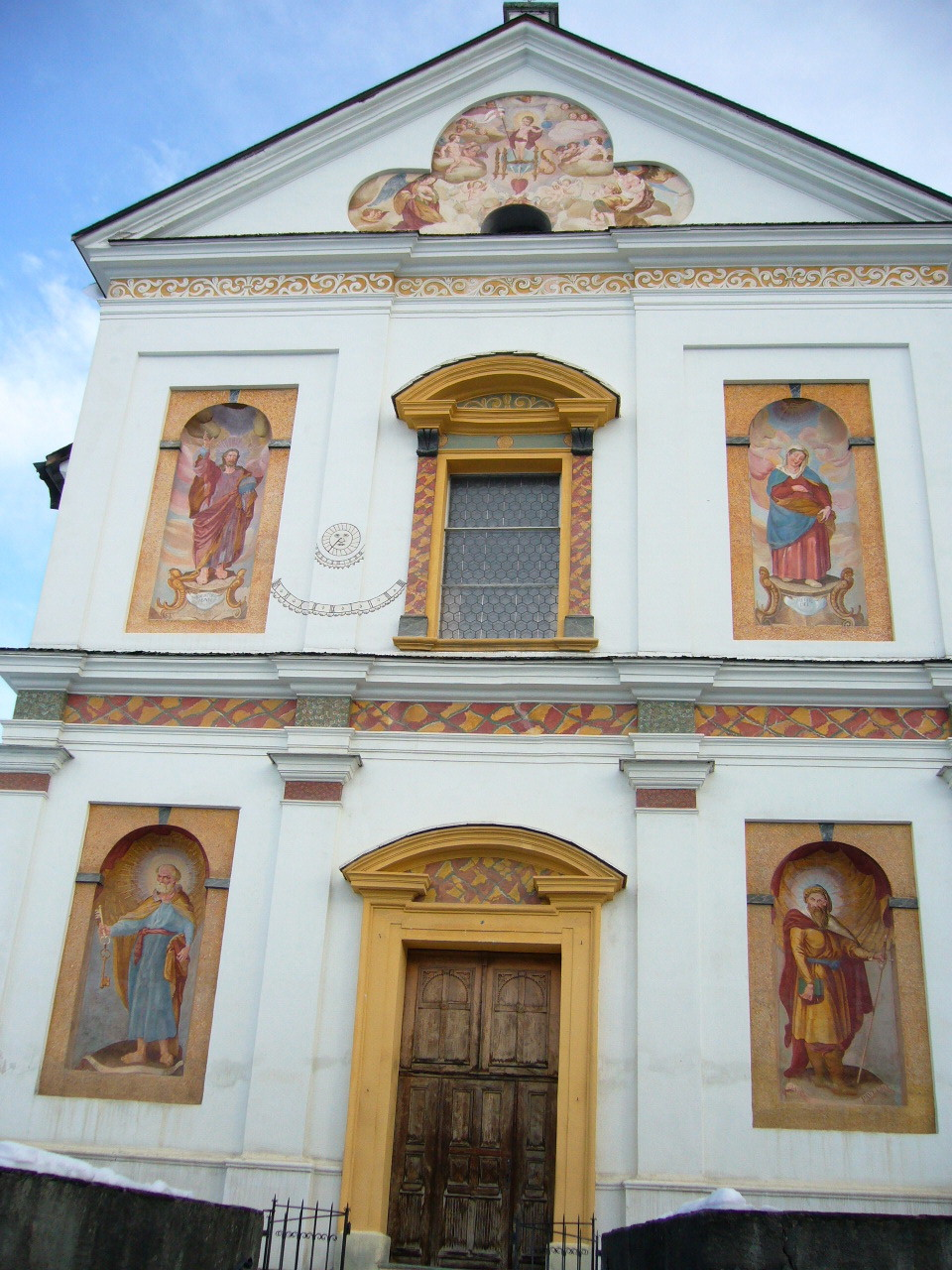 Schluein, Kanton Graubünden, Schweiz. Fassade der Dorfkirche.